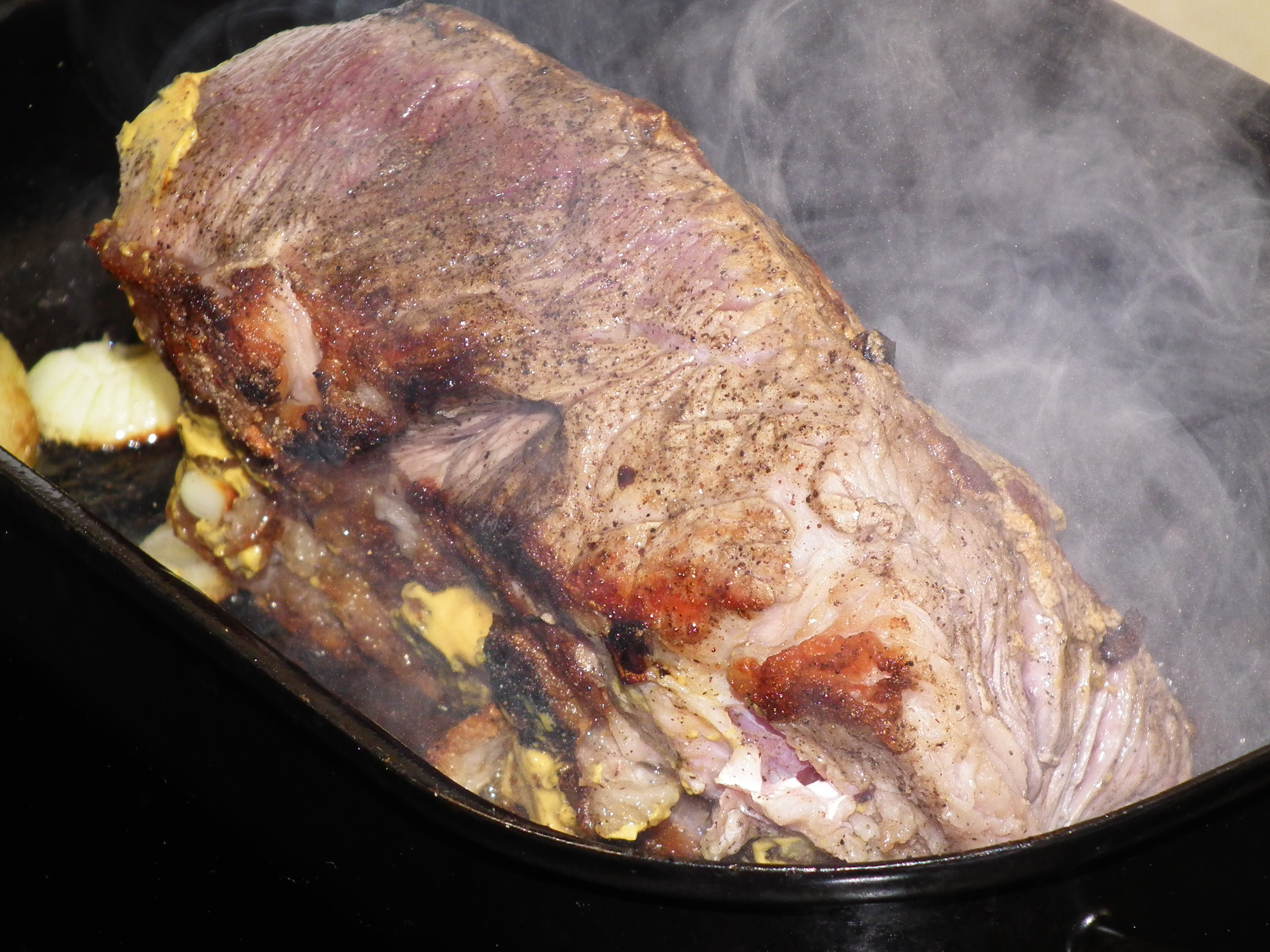 Rinderfilet am Stück